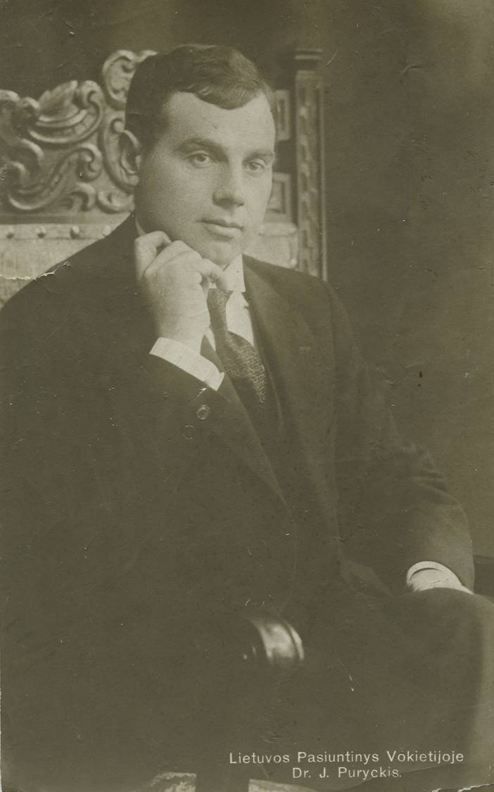 Juozas Purickis (1883–1934) – Lietuvos diplomatas, žurnalistas, publicistas, visuomenės veikėjas.